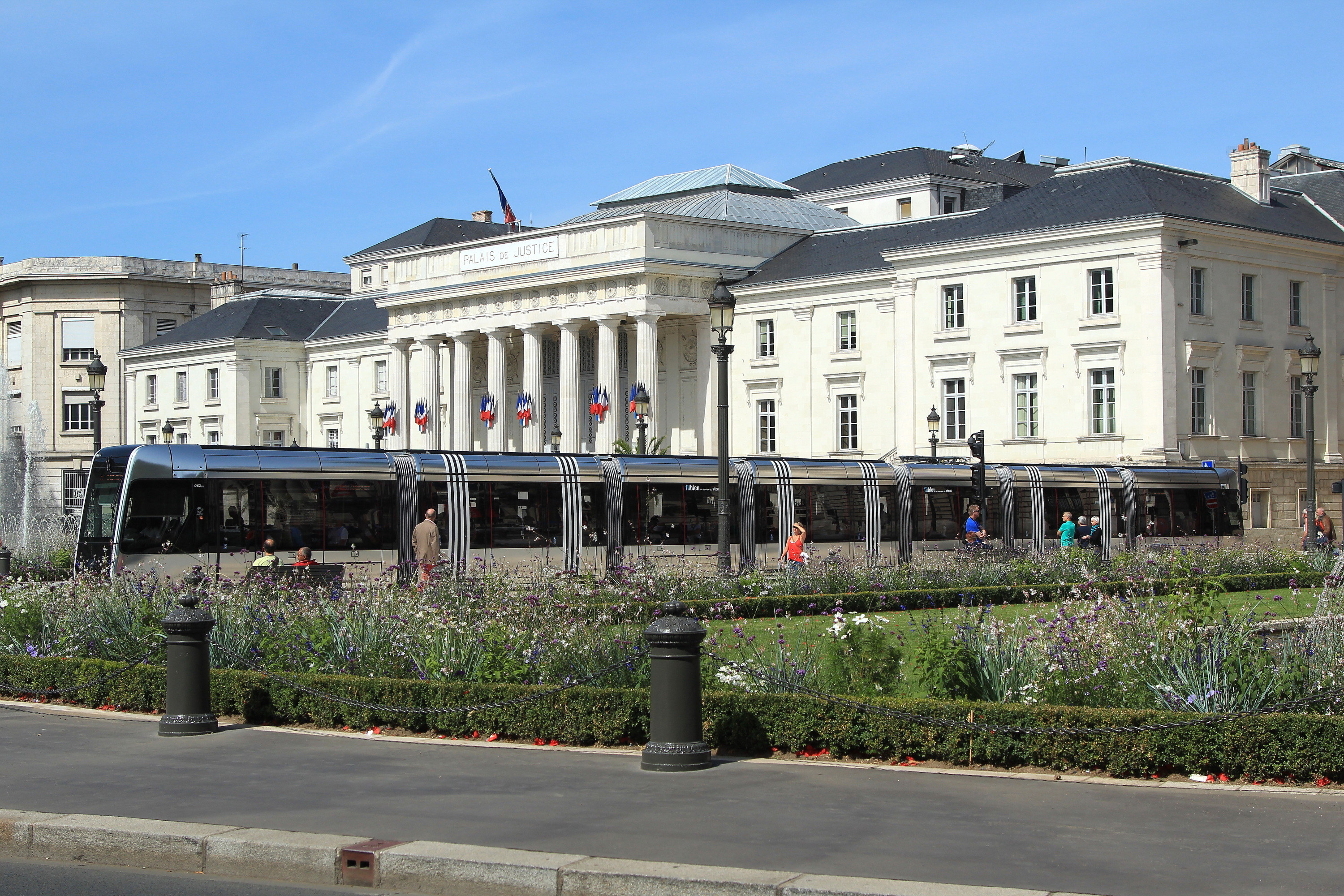 La rame du tramway de Tours n°62 arrive à la station "Jean Jaurès", passant devant le palais de justice.